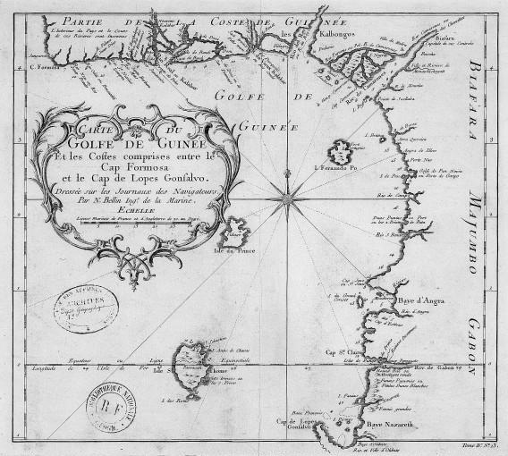 Carte du golfe de Guinée et les costes comprises entre le cap Formosa et le cap de Lopes Goncalvo / dressée sur les journaux des navigateurs par N. Bellin, 1740-1749